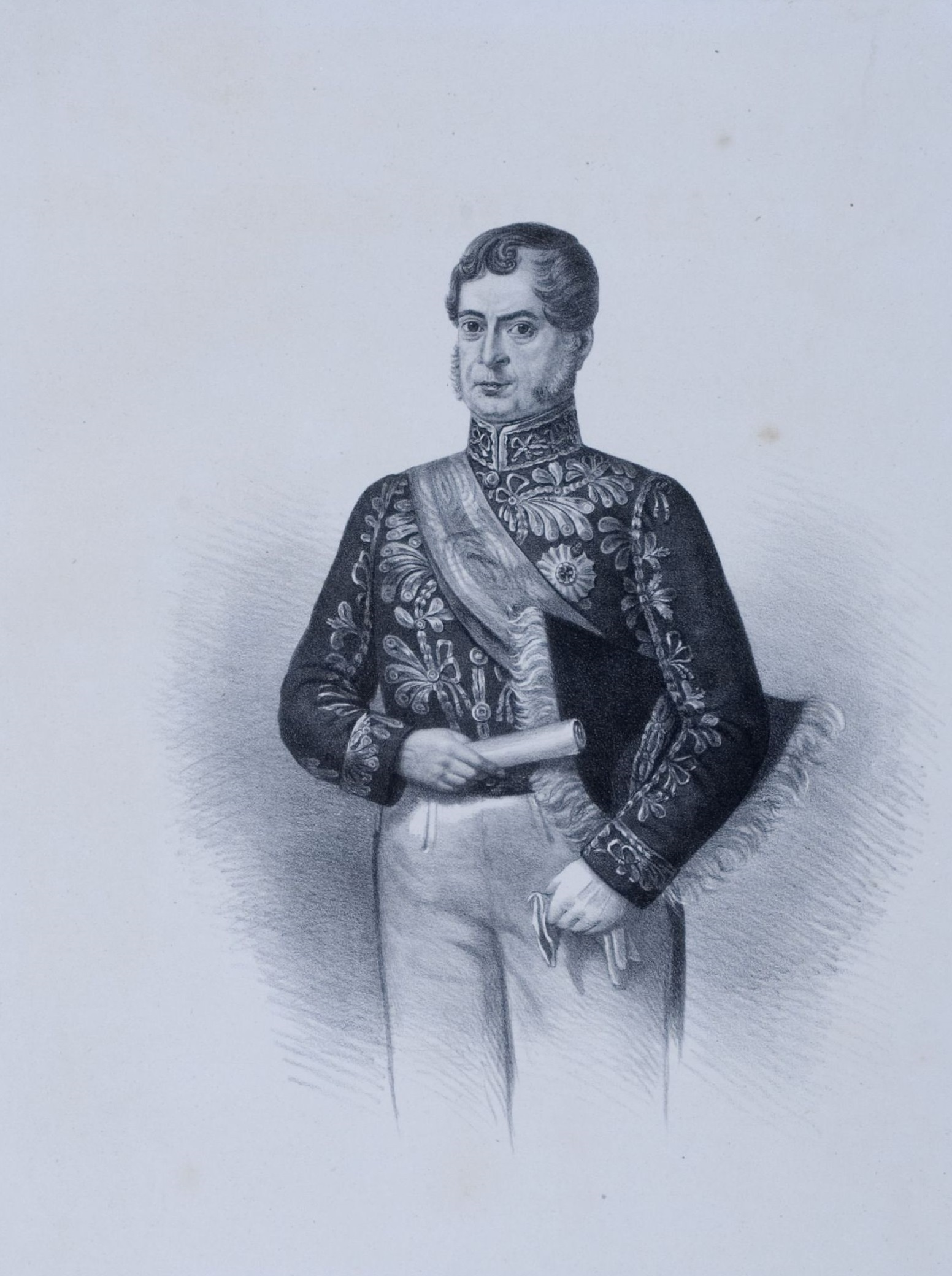 Retrato em litografia de D. Francisco de Assis Mascarenhas (1779 - 1846)